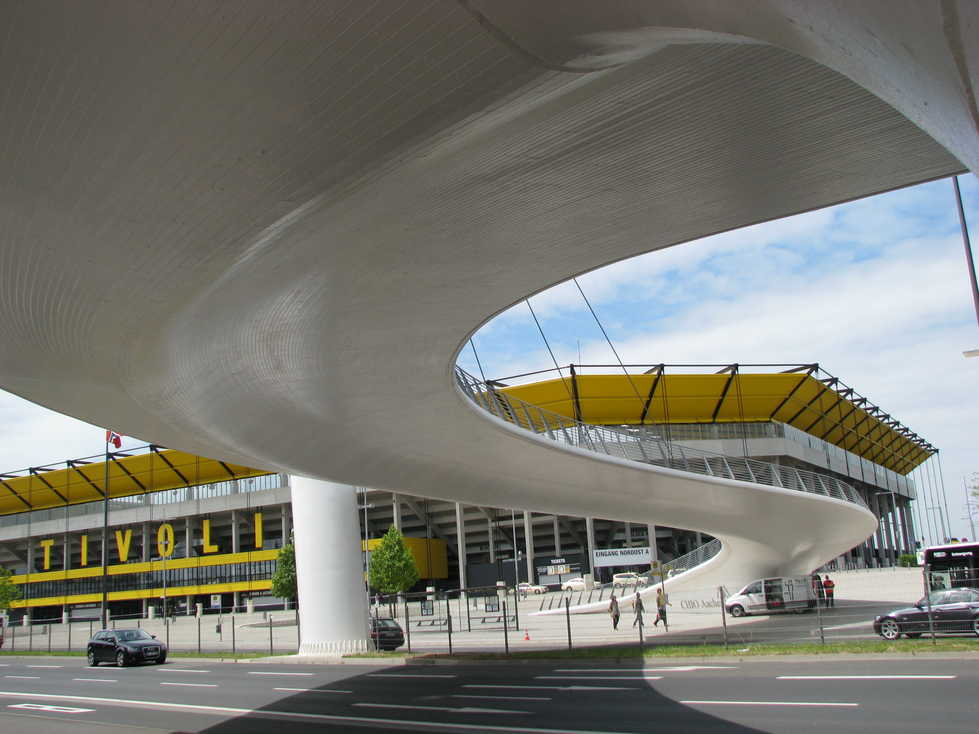 CHIO-Brücke über die Krefelder Straße (B57) zwischen Tivoli und Finanzamt am Sportpark Soers in Aachen. Bauzeit: 03/2011 - 06/2013, Baukosten: 2,2 Mio Euro brutto